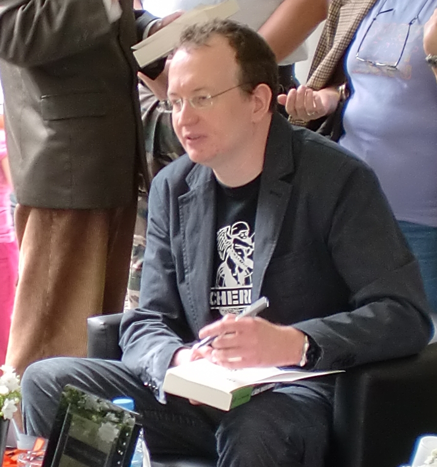 Robert Muchamore na Feira do Livro de Lisboa - edição 2011.